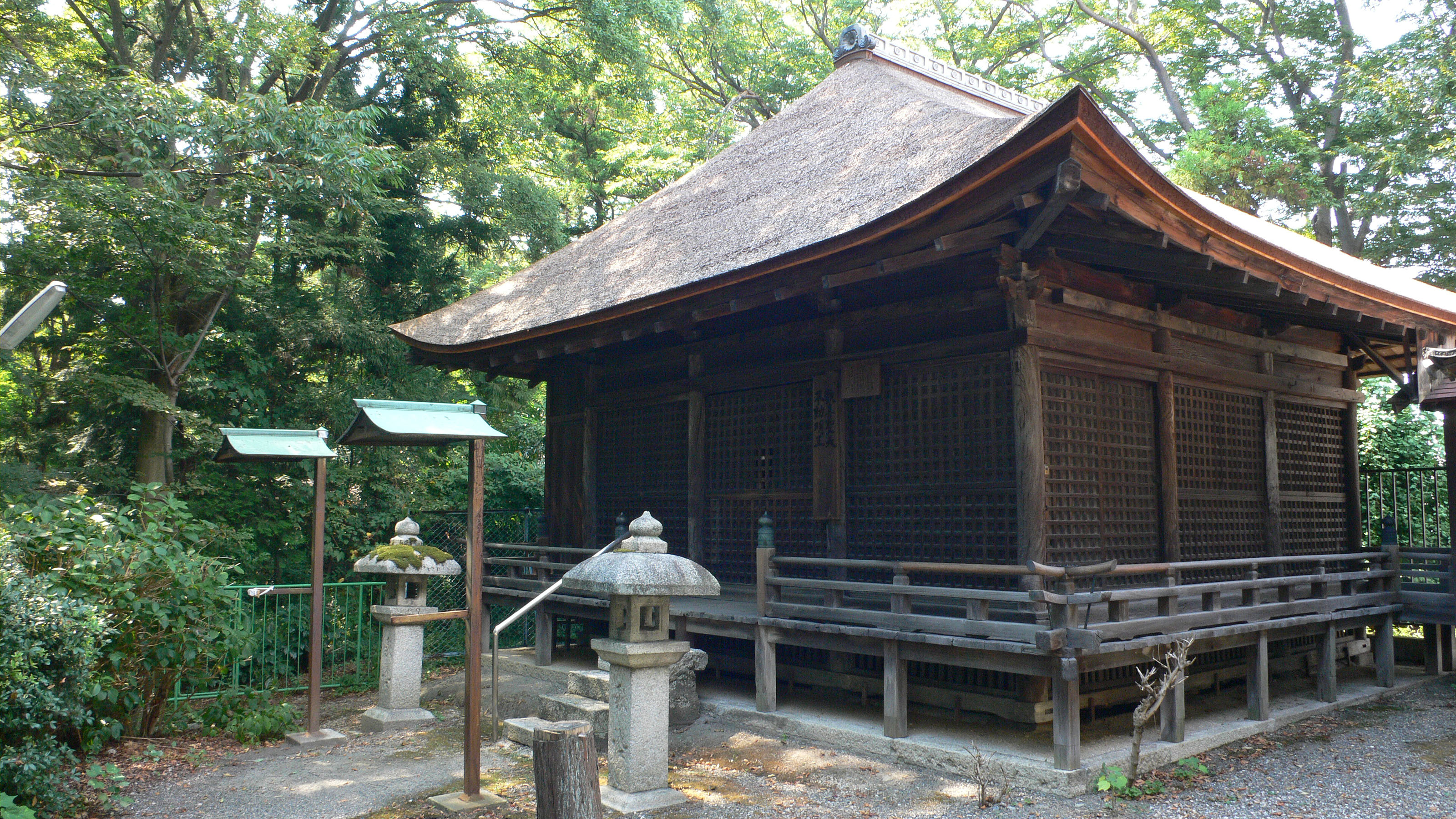 Shanain in Nagahama, Shiga, Japan